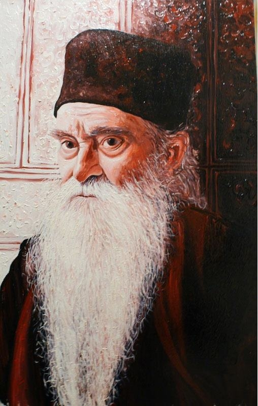 Arhimandritul Arsenie Papacioc, Mănăstirea Sfânta Maria din Techirghiol, pictură pe lemn în ulei 2011